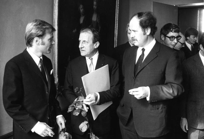 18.3.1968 Berlin/West Verleihung der Berliner Kunstpreise in der Eichengalerie v.l.n.r.: Helmut Griem, Schauspieler, Preis für Darstellende Kunst, Junge Generation, Hans Lietzau, Regisseur, Preis für Darstellende Kunst, Johannes Schaaf, Regisseur, Preis für Fernsehen, Junge Generation